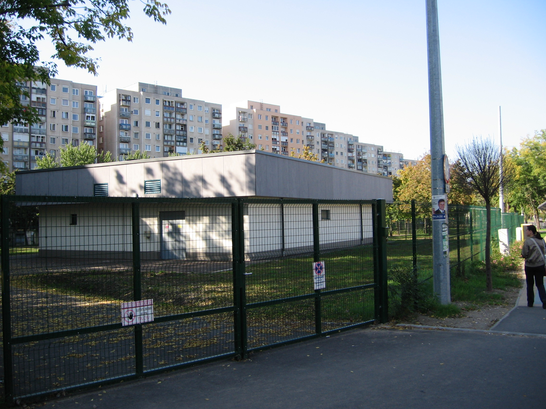 Transzformátorház (áramátalakító) a Károlyi Mihály utcánál.